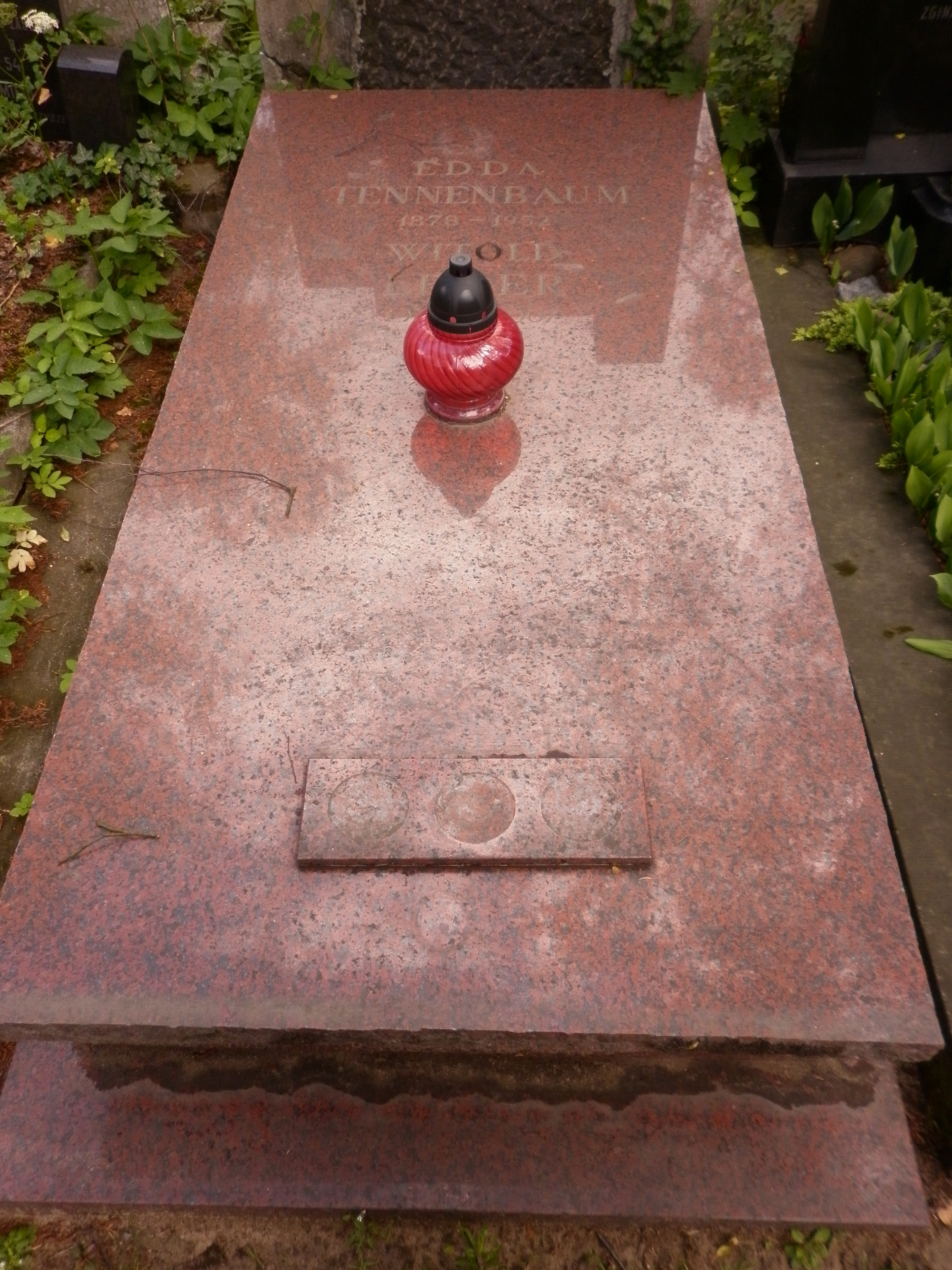 Grób Witolda Ledera na Cmentarzu Wojskowym na Powązkach (oraz Enna Tennenbaum)